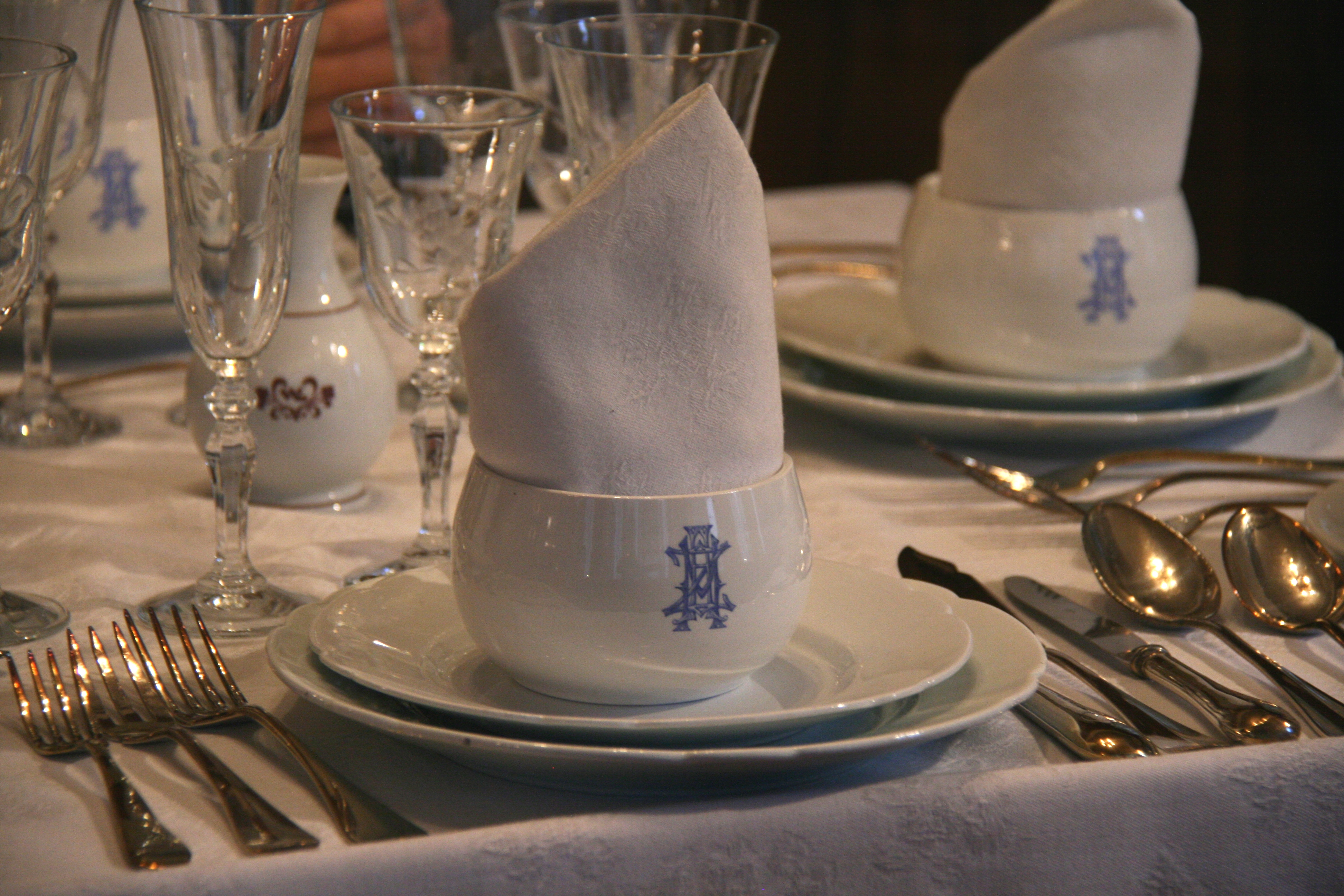 Servicio de Mesa en un Wagon de Lujo